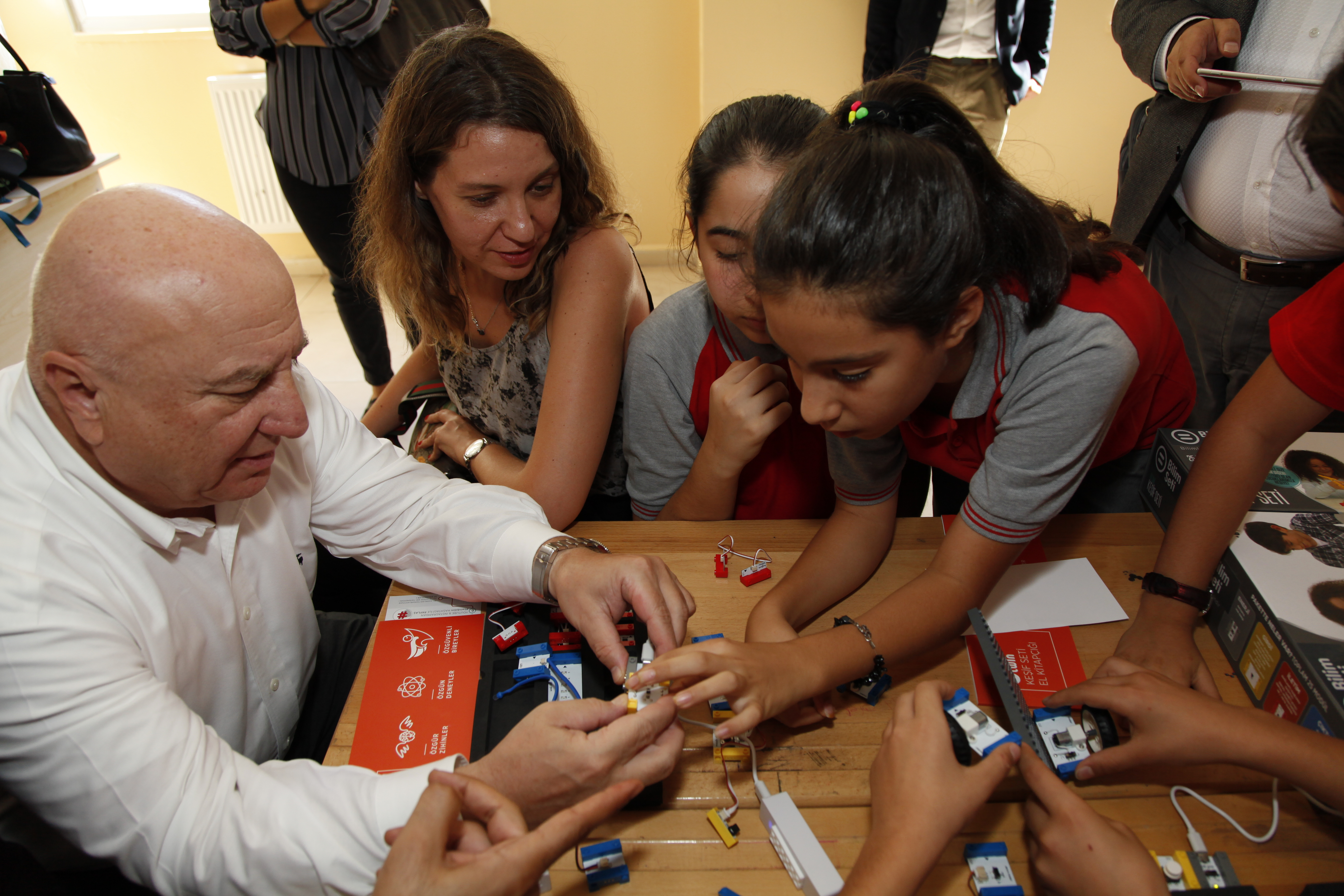 Hatay'da Bilim Seferberliği esnasında yapılan bir bilim seansı.